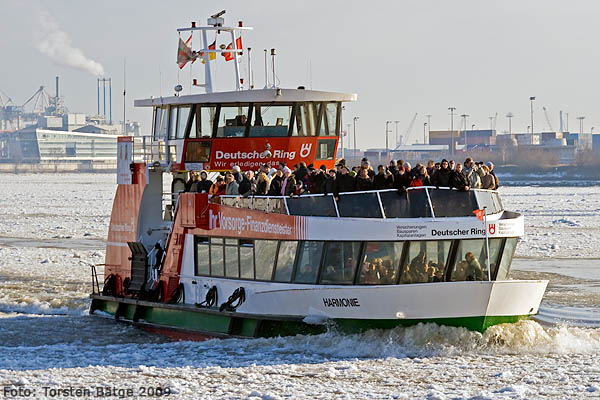 Die HADAG-Fähre MS Harmonie, hier kurz vor Erreichen des Anlegers Neumühlen/Övelgönne, verkehrt auf der HVV-Linie 62 Sandtorhöft–Landungsbrücken–Finkenwerder.